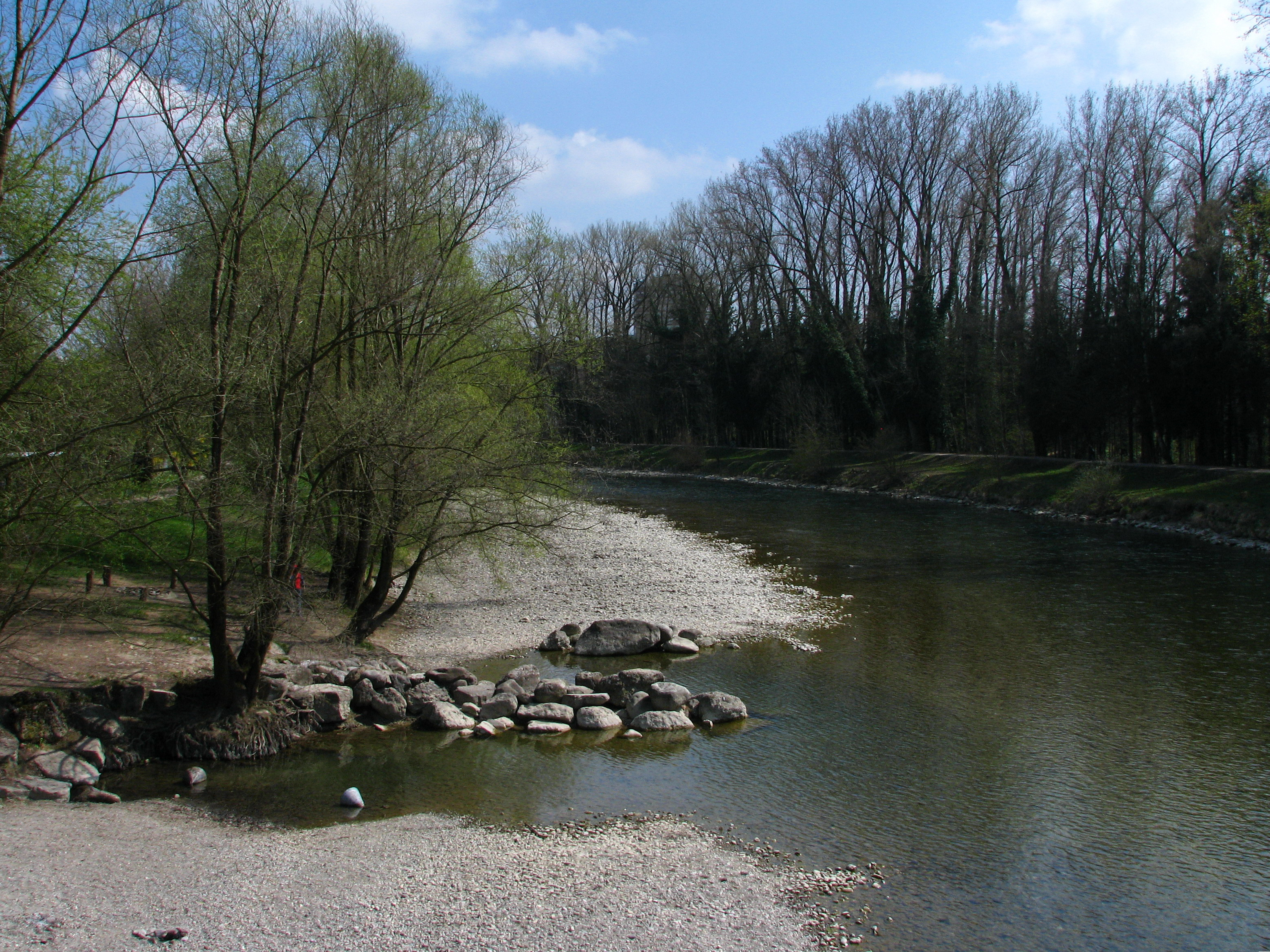 Werdinsel in Zürich-Höngg